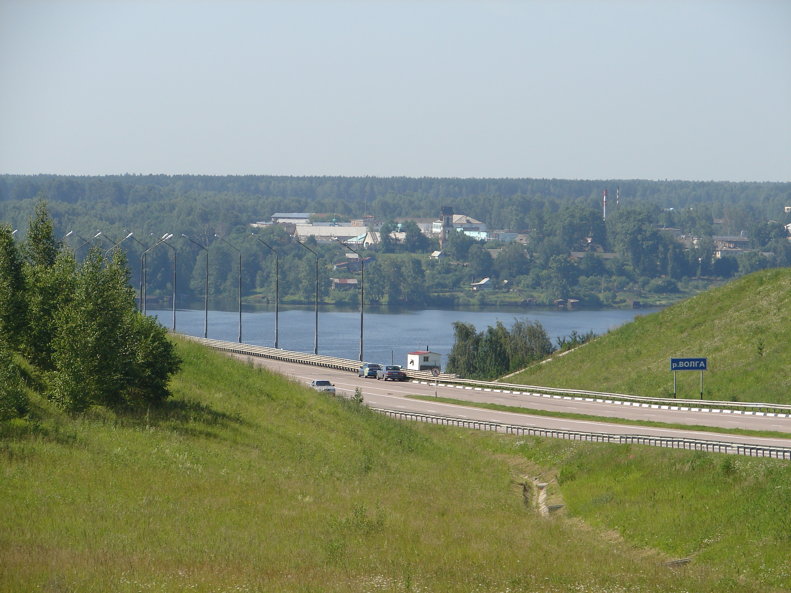 Подъезд к Кинешемскому мосту с левого берега